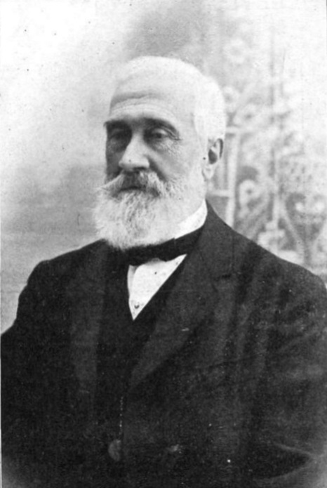 José Erasmo de Janer